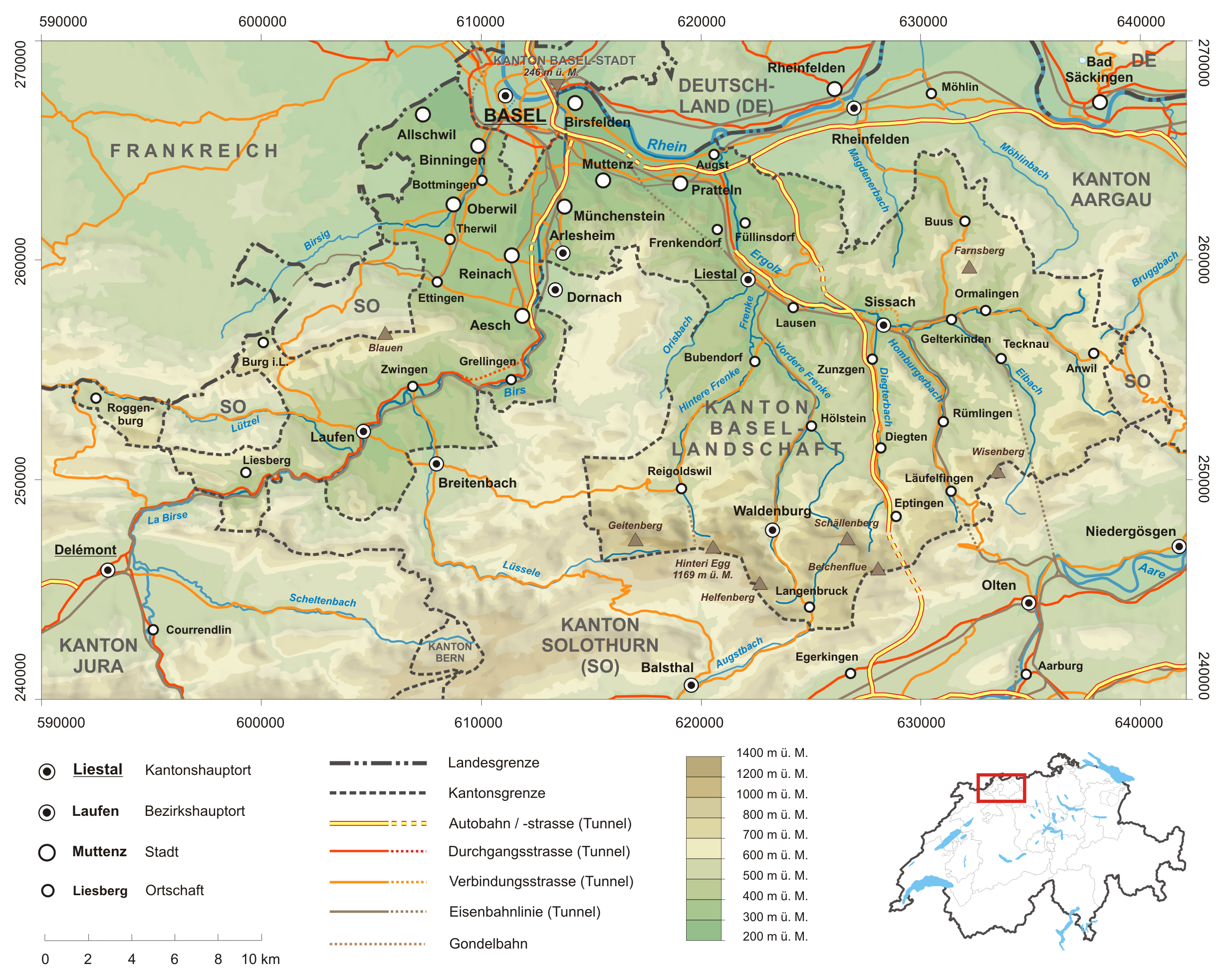 Karte des Kanton Basel-Landschaft. Topographischer Hintergrund: NASA Shuttle Radar Topography Mission (public domain). SRTM3 v.2.